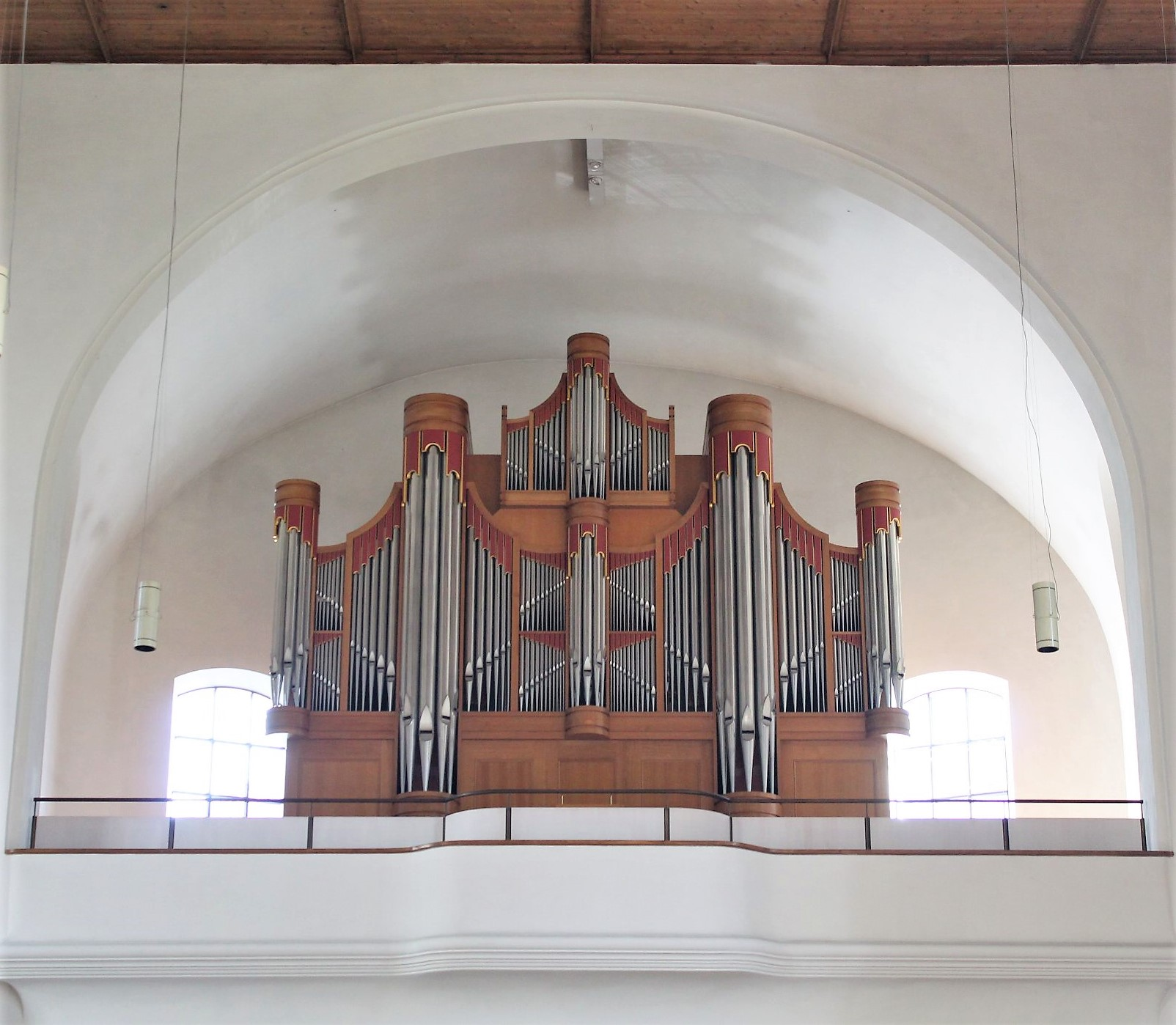 Orgel von St. Franziskus in München (1997 Van den Heuvel, III/51)